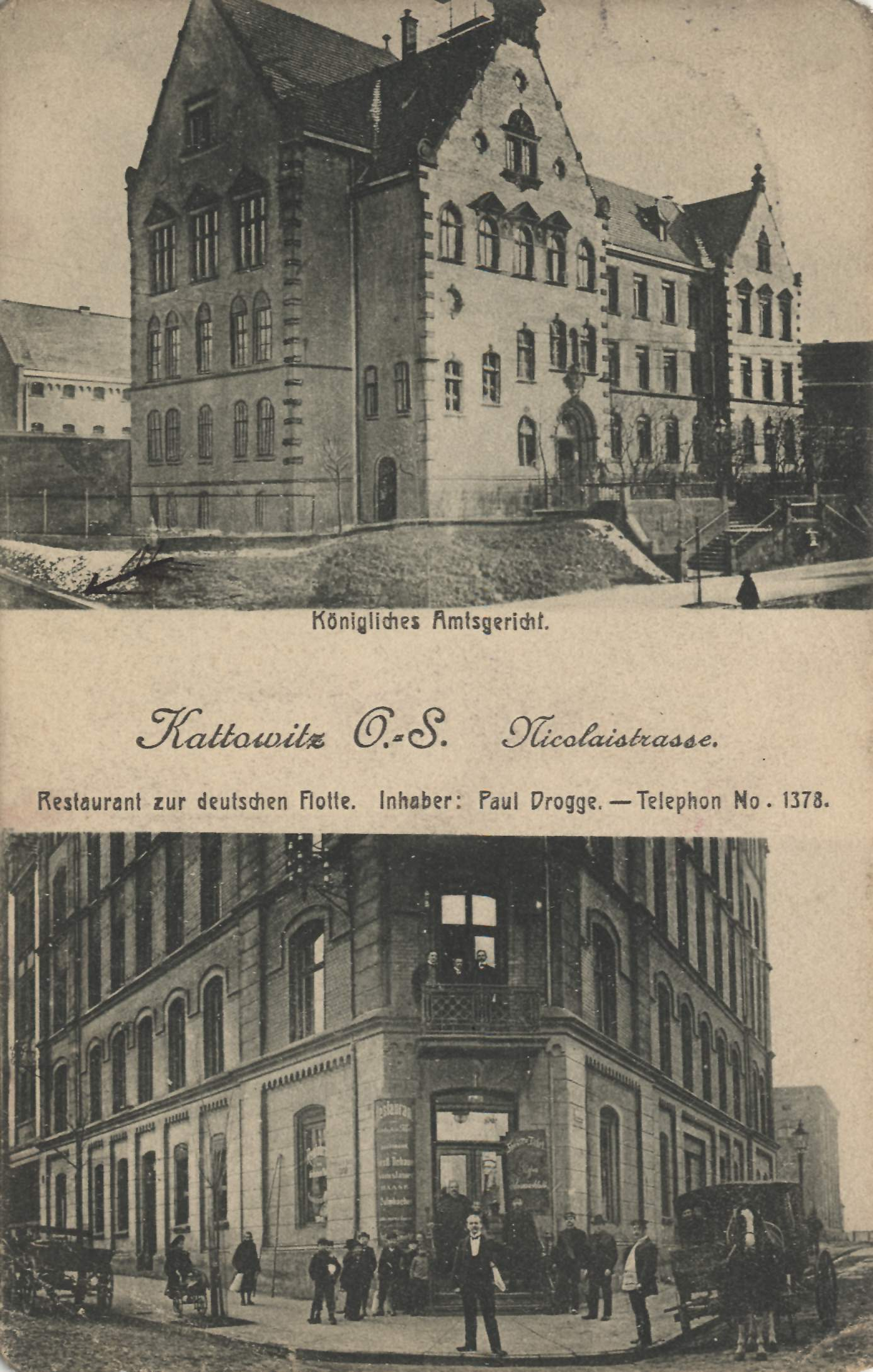 Katowice. Ulica Mikołowska. Gmach Sądu Okręgowego.